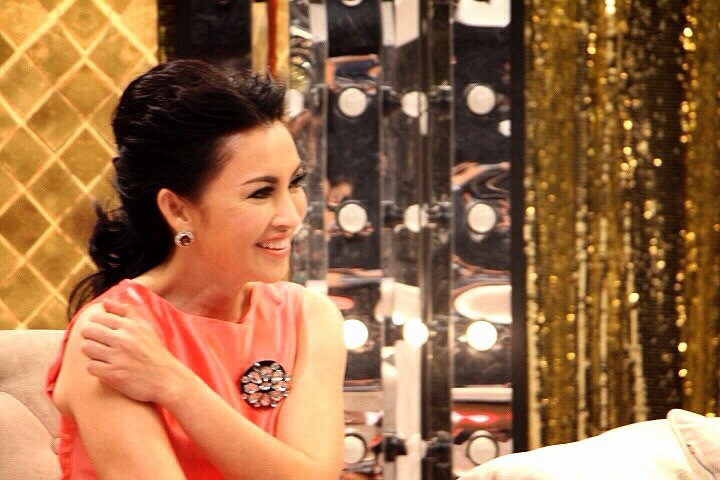 พิมลวรรณ หุ่นทองคำ